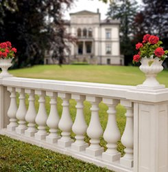 foto di balaustra in pietra naturale, eseguita da me in gita scolastica a parigi